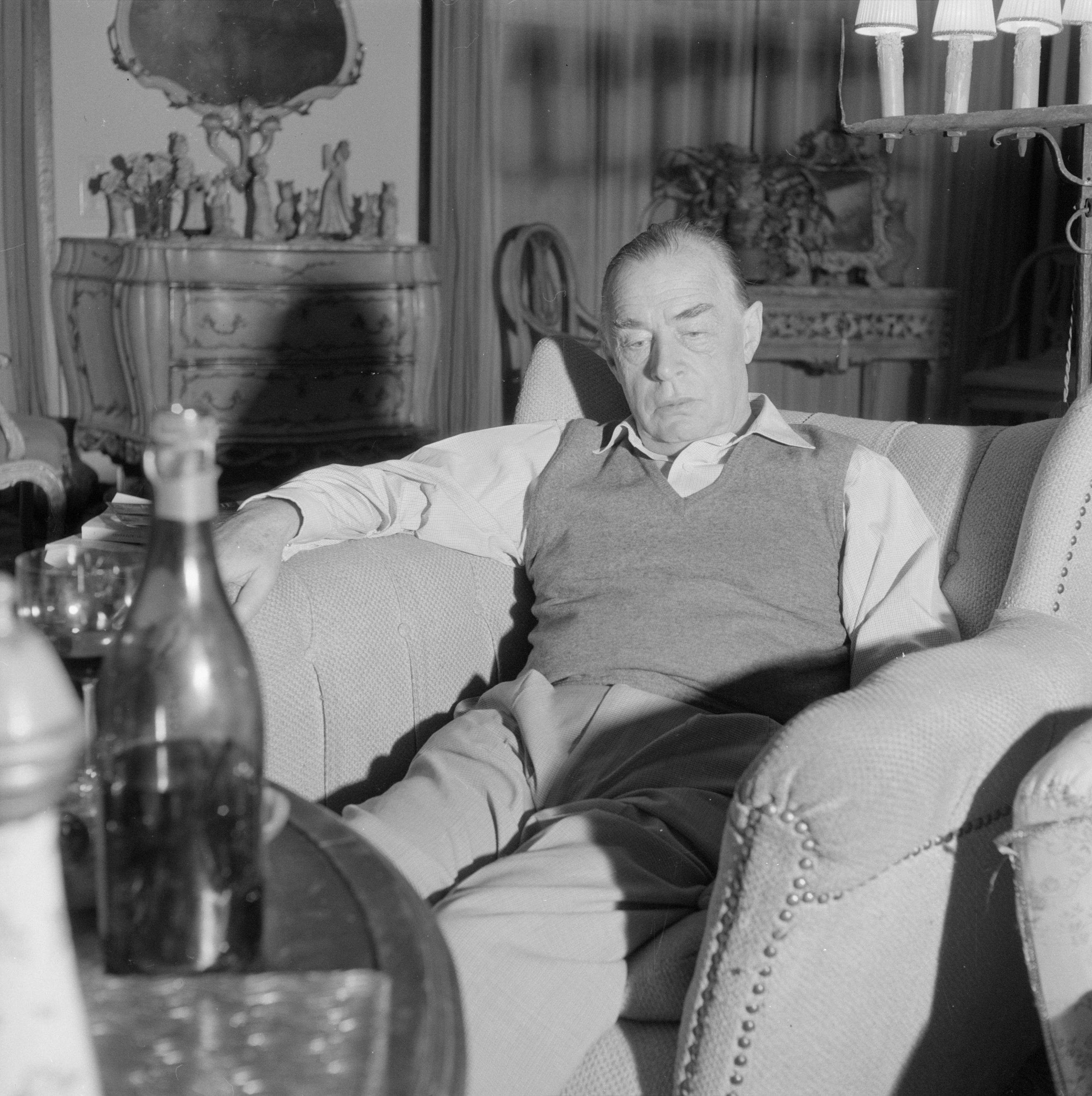 Collectie / Archief : Fotocollectie Van de Poll Reportage / Serie : Bezoek aan de Duitse auteur Erich Maria Remarque en de Amerikaanse actrice Paulette Goddard in hun villa in het Zwitserse Porto Ronco Beschrijving : Remarque in gesprek, zittende in een armstoel in zijn woonkamer in de villa in Porto Ronco Datum : oktober 1961 Locatie : Lago Maggiore, Zwitserland Trefwoorden : interieurs, schrijvers, woningen Persoonsnaam : Remarque, Erich Maria Fotograaf : Poll, Willem van de Auteursrechthebbende : Nationaal Archief Materiaalsoort : Negatief (6x6) Nummer archiefinventaris : bekijk toegang 2.24.14.02 Bestanddeelnummer : 254-4727